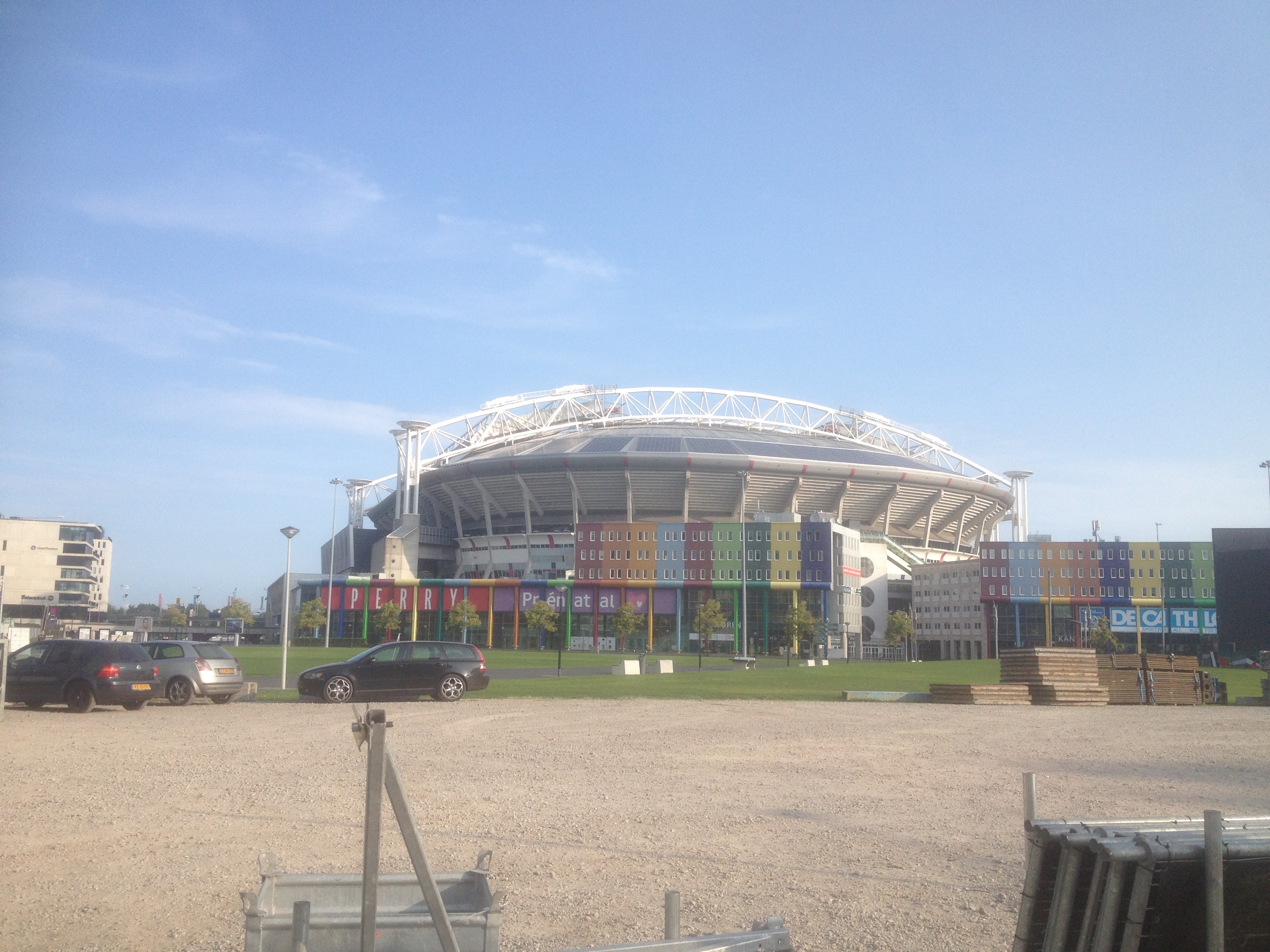 Vlakbij het stadion is een terrein waar diverse muziekfestivals worden georganiseerd.